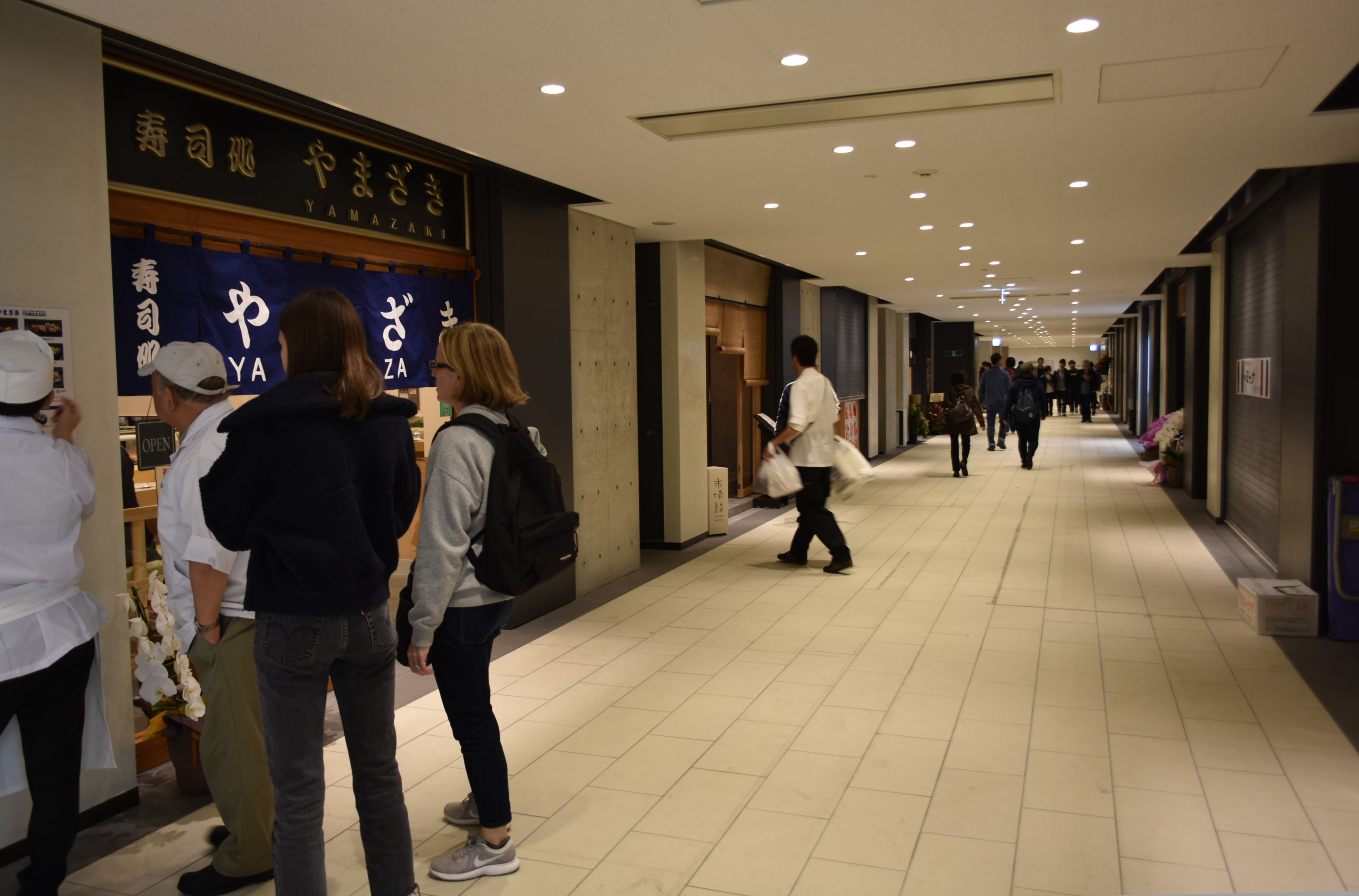 豊洲市場 水産仲卸売場棟